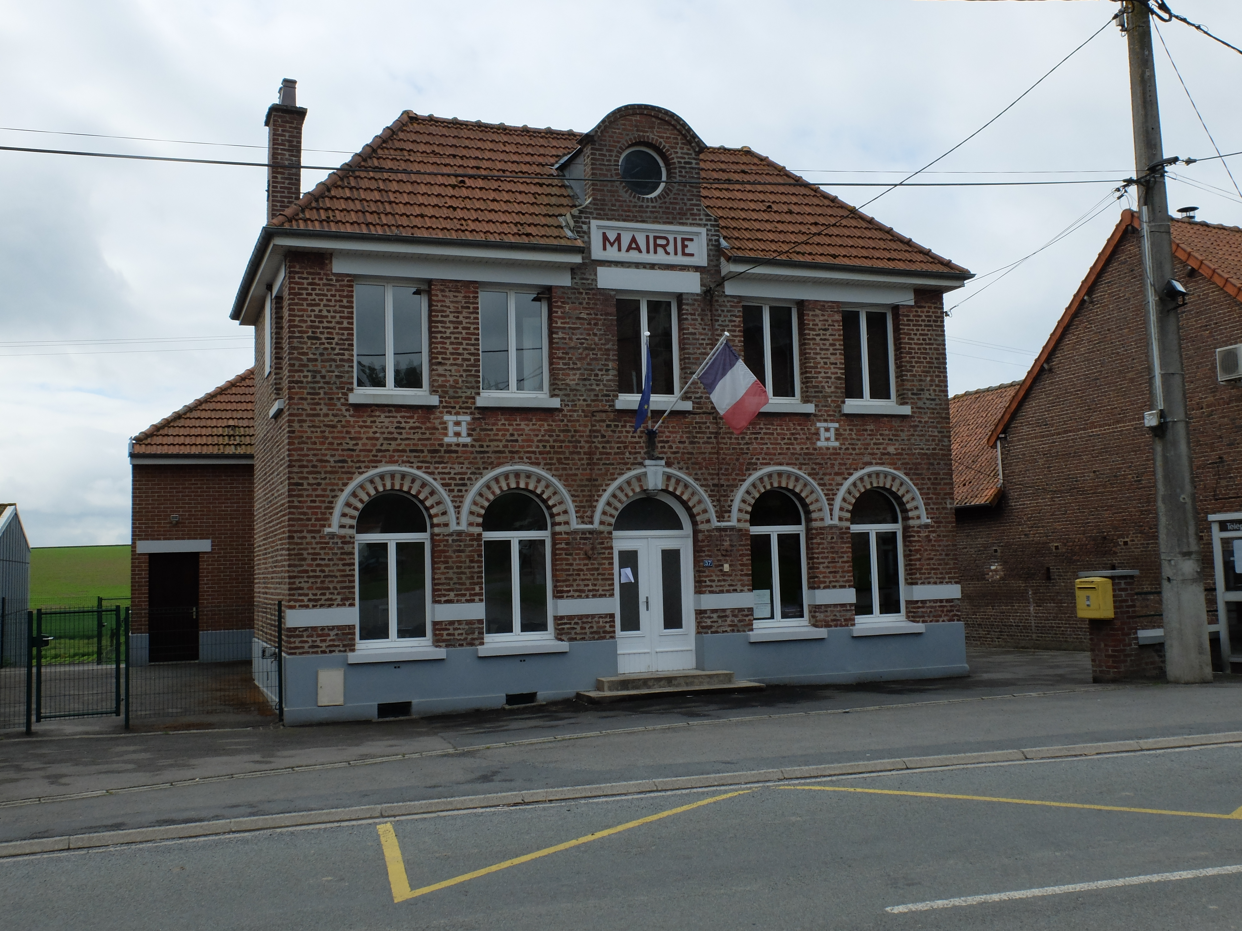 Vue de la mairie de Noreuil.